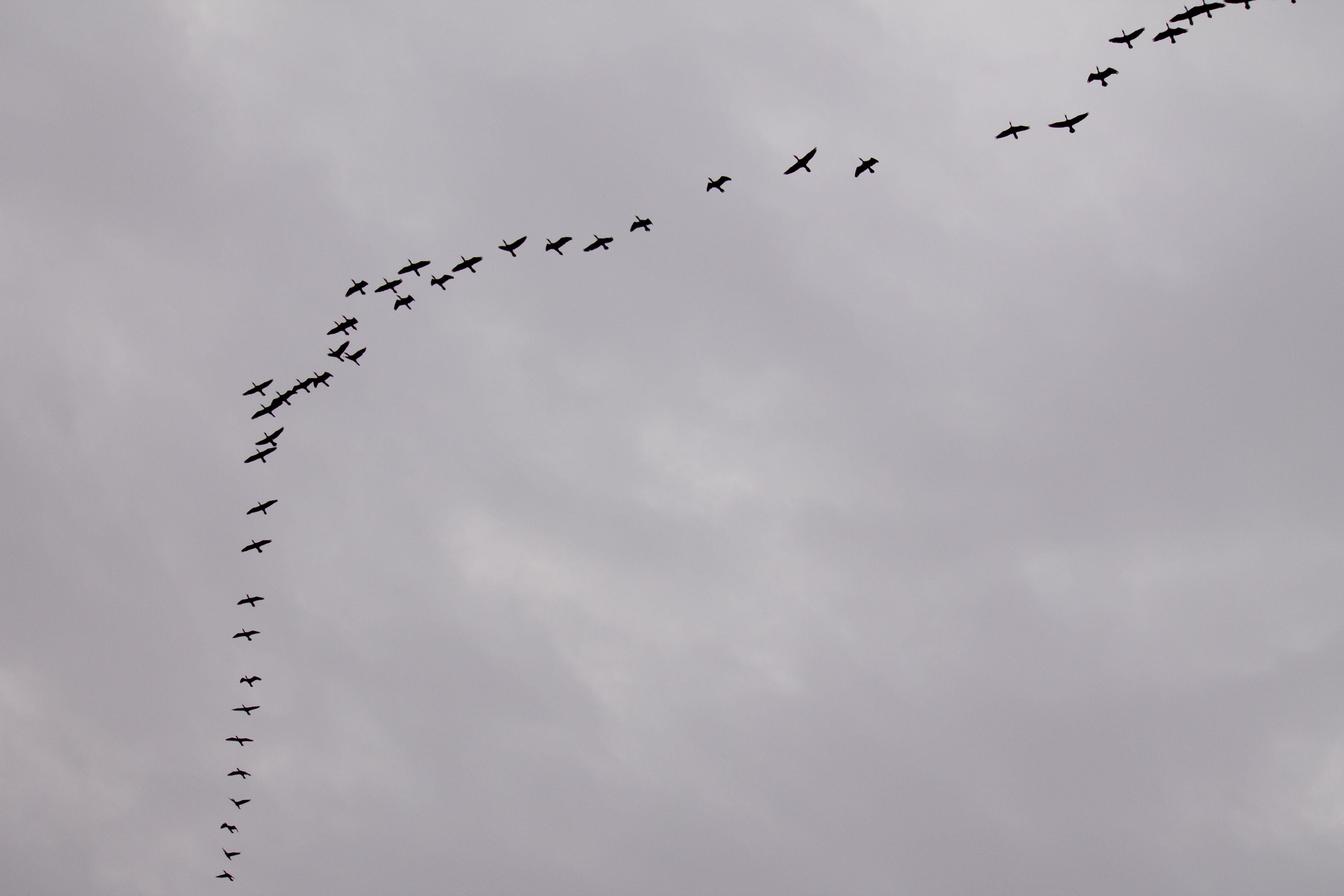 ദേശാടനപ്പക്ഷികൾ